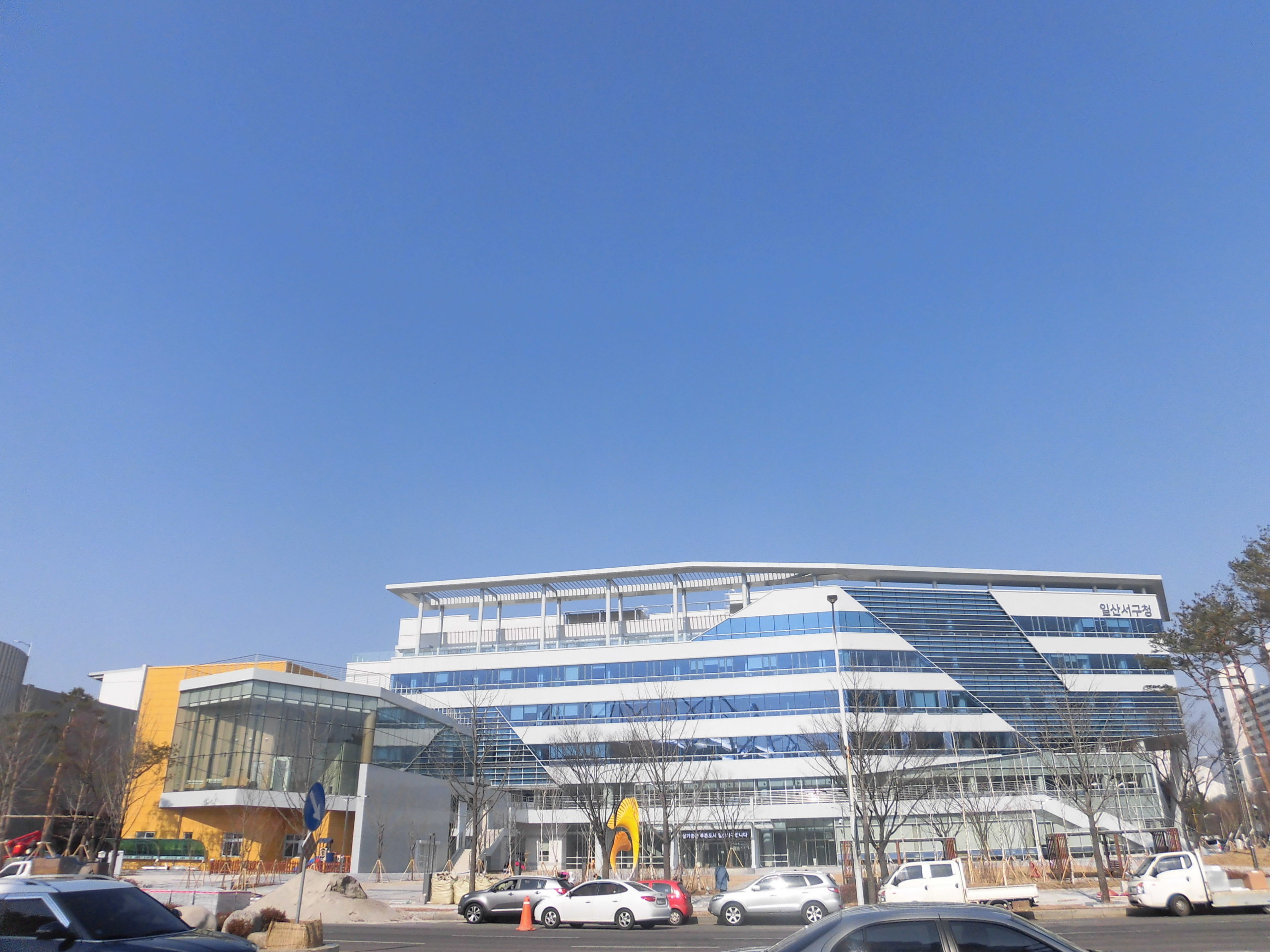 경기도 고양시에 있는 일산서구청